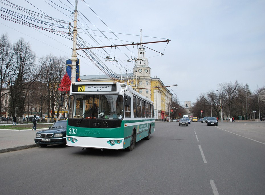 Запущен новый троллейбусный маршрут №7а. С этого момента началось возрождение воронежского троллейбуса.